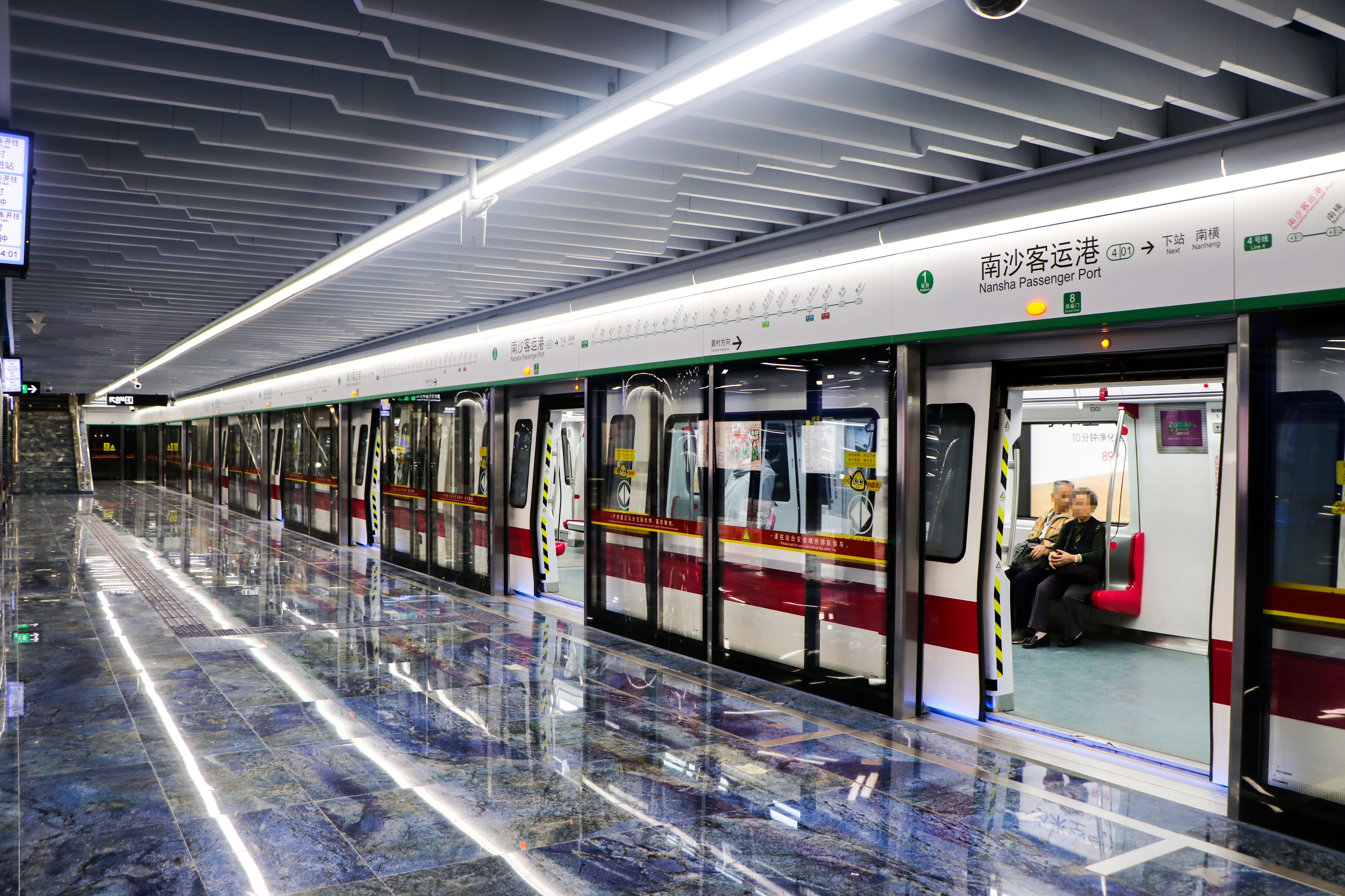 广州地铁南沙客运港站